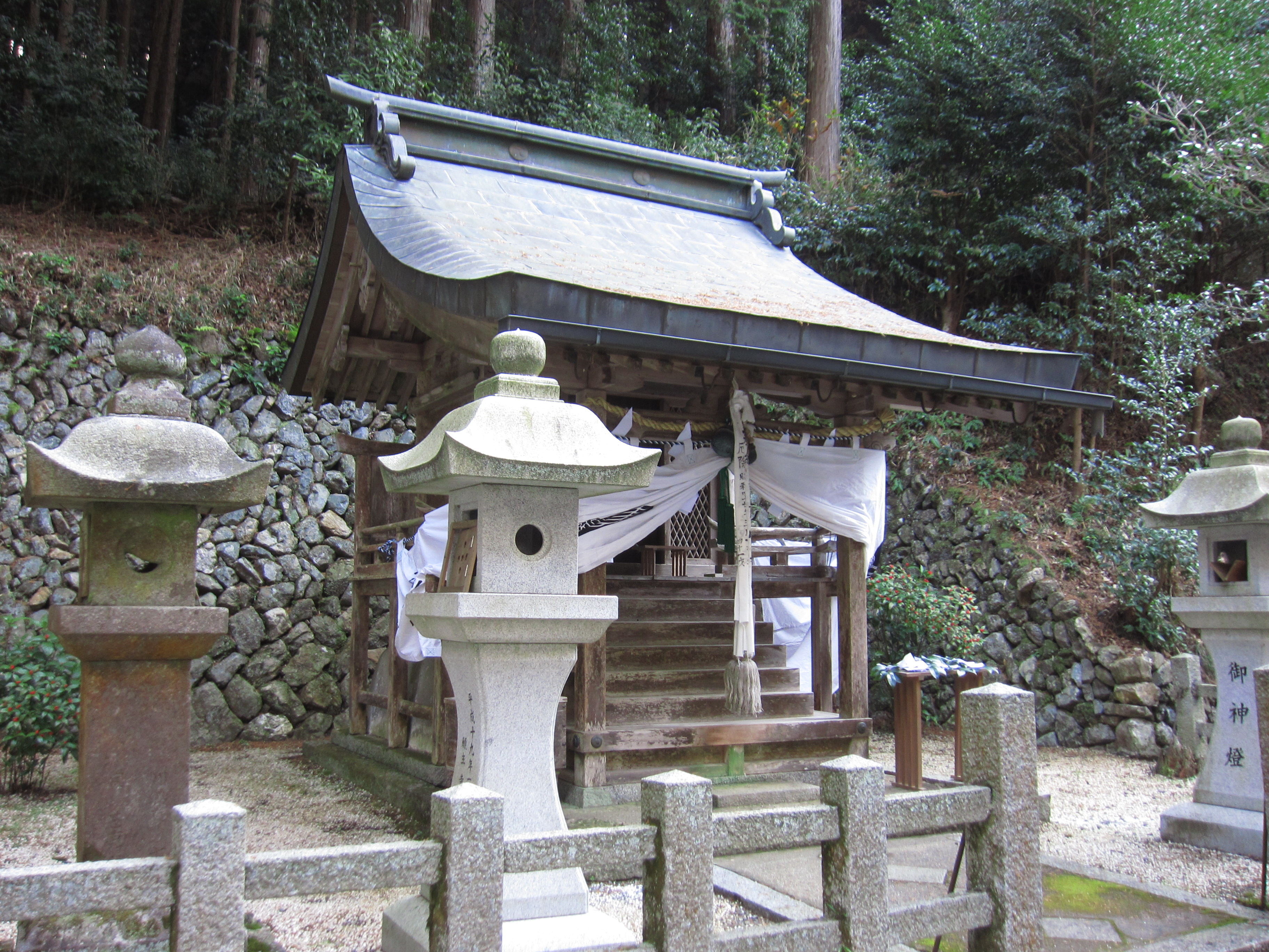 愛宕神社 (亀岡市) 境内社八幡宮神社